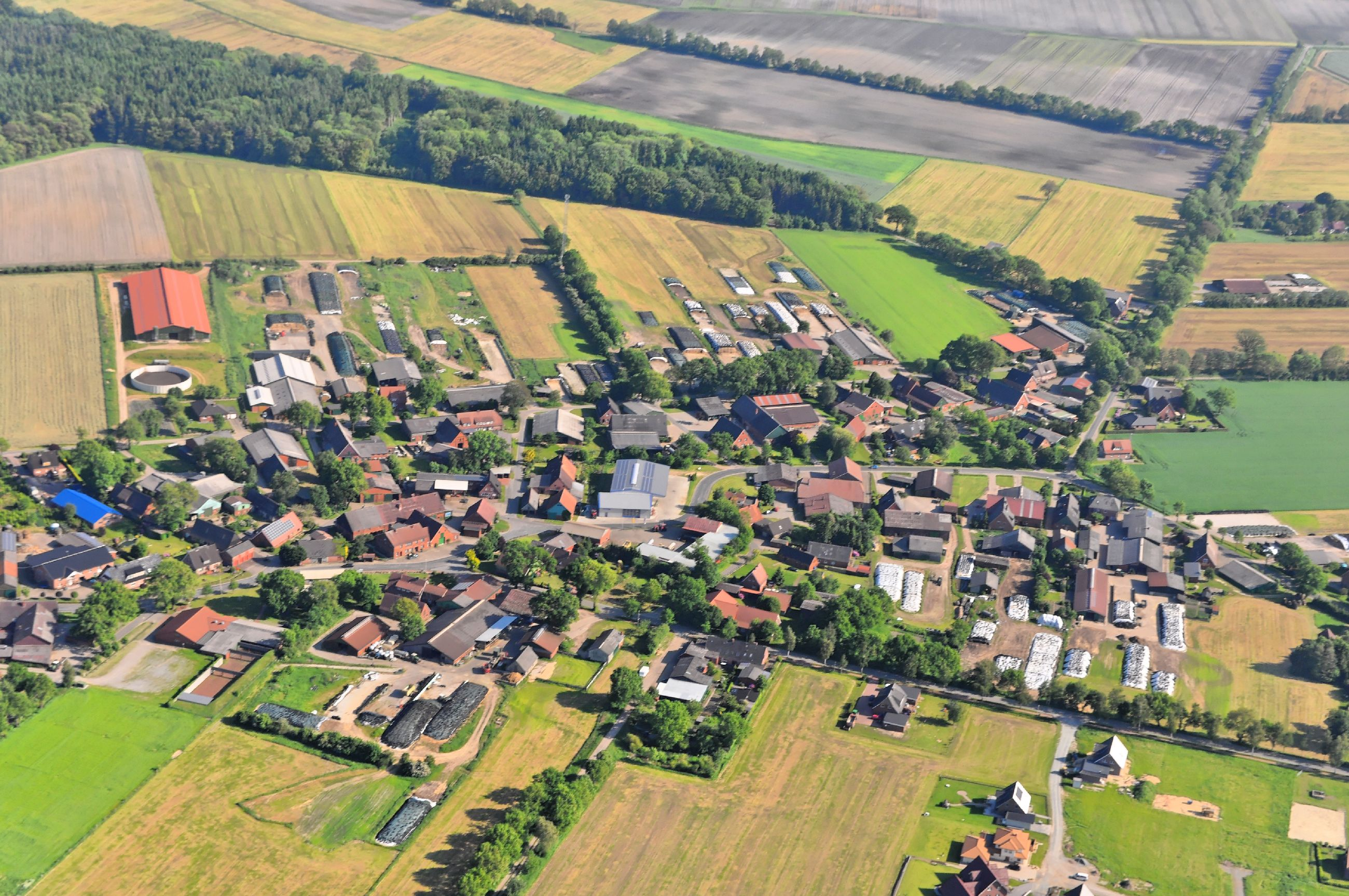 Überführungsflug vom Flugplatz Nordholz-Spieka über Lüneburg, Potsdam zum Flugplatz Schwarzheide-Schipkau